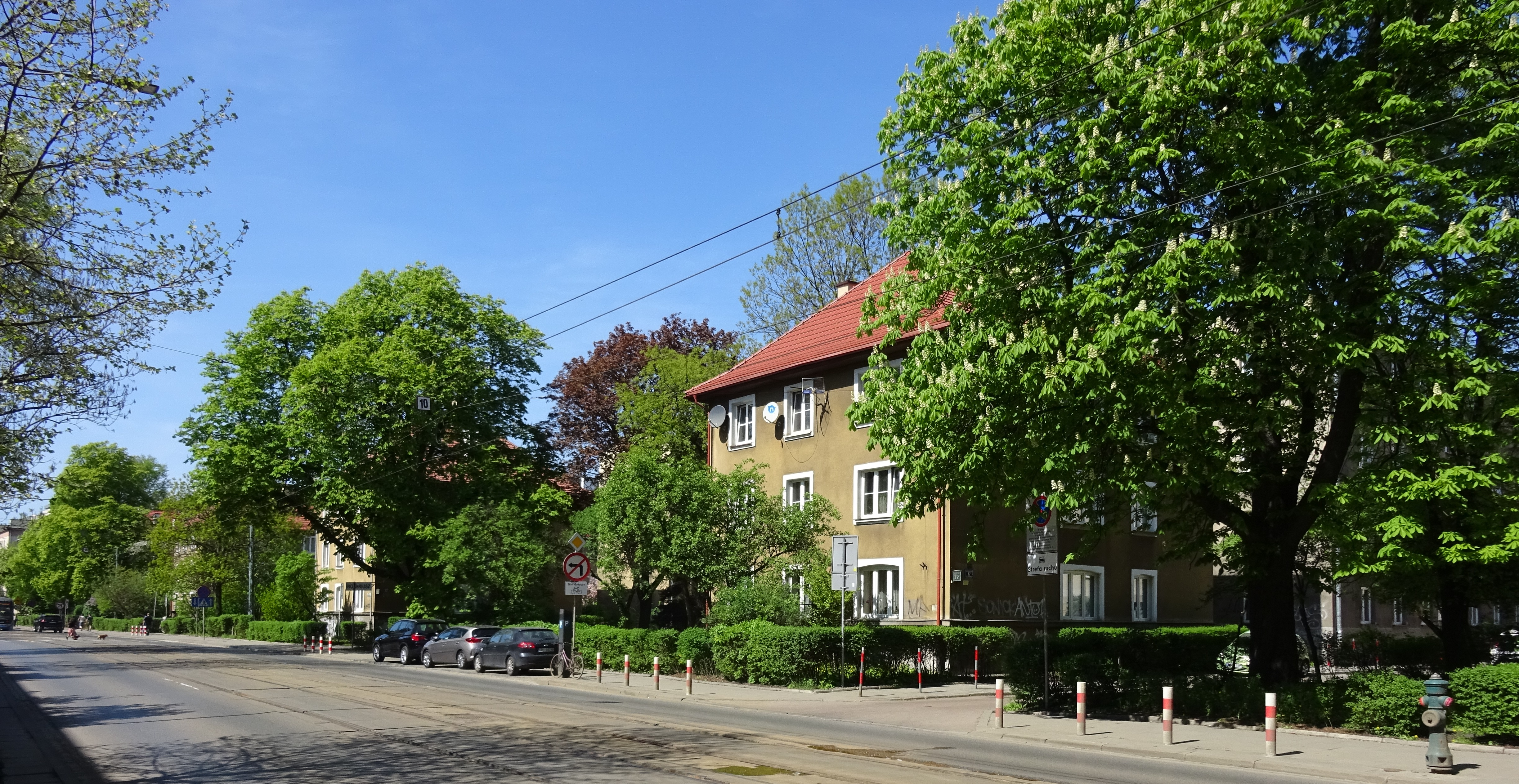 Osiedle urzędników Generalnego Gubernatorstwa w Krakowie przy ul. Królewskiej. 2018